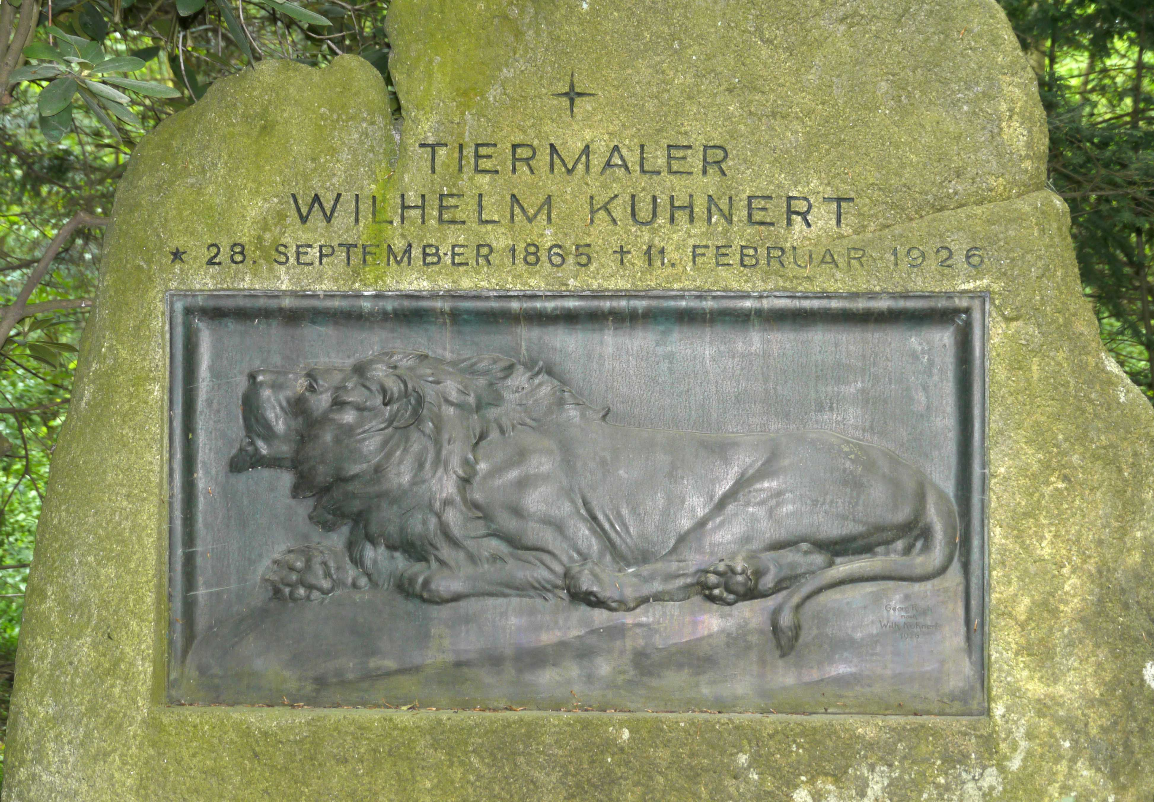 Grabstein von Wilhelm Kuhnert, Südwestkirchhof Stahnsdorf